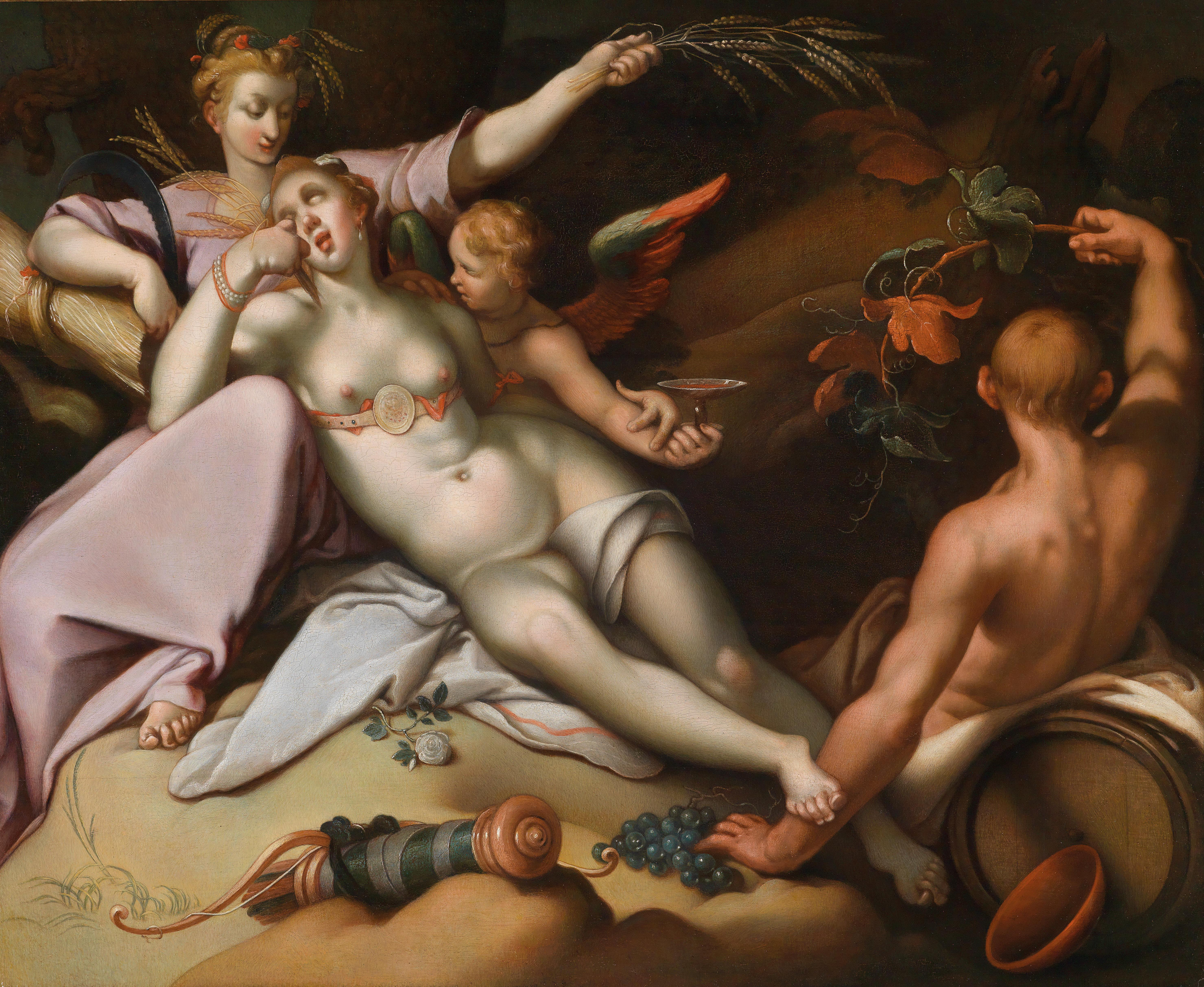 Sine Baccho et Cenere friget Venus, Öl auf Holz, 66 x 78,5 cm